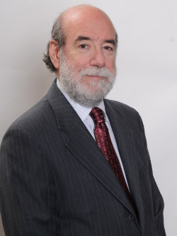 Enrique Accorsi Opazo